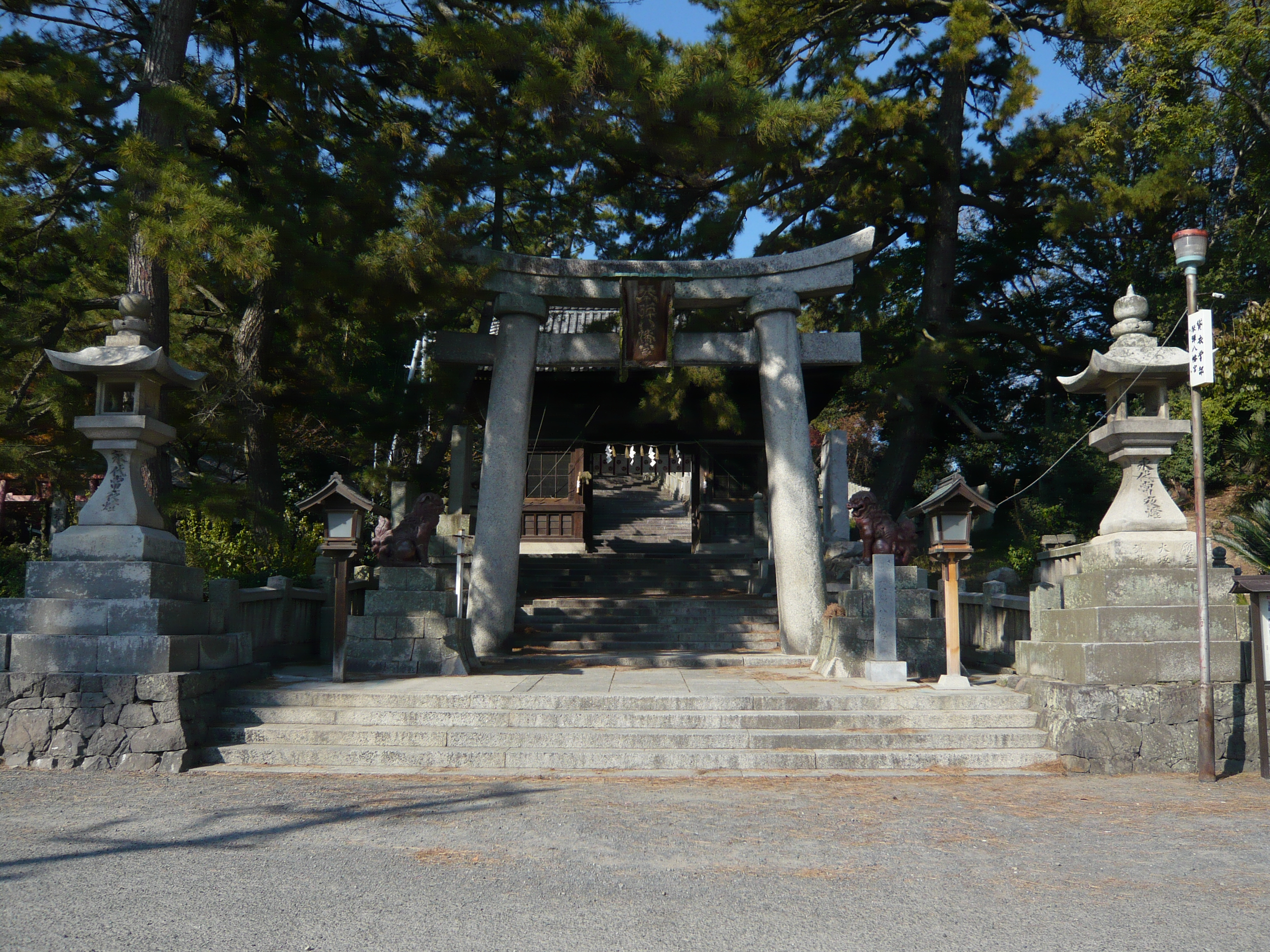 Kotohiki-hachiman-gū, Kan'onji, Kagawa, Japan 琴弾八幡宮（香川県観音寺市）